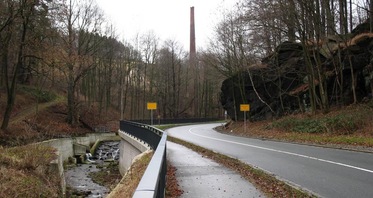 Felsengluck an der Staatsstraße zwischen Globenstein und Rittersgrün